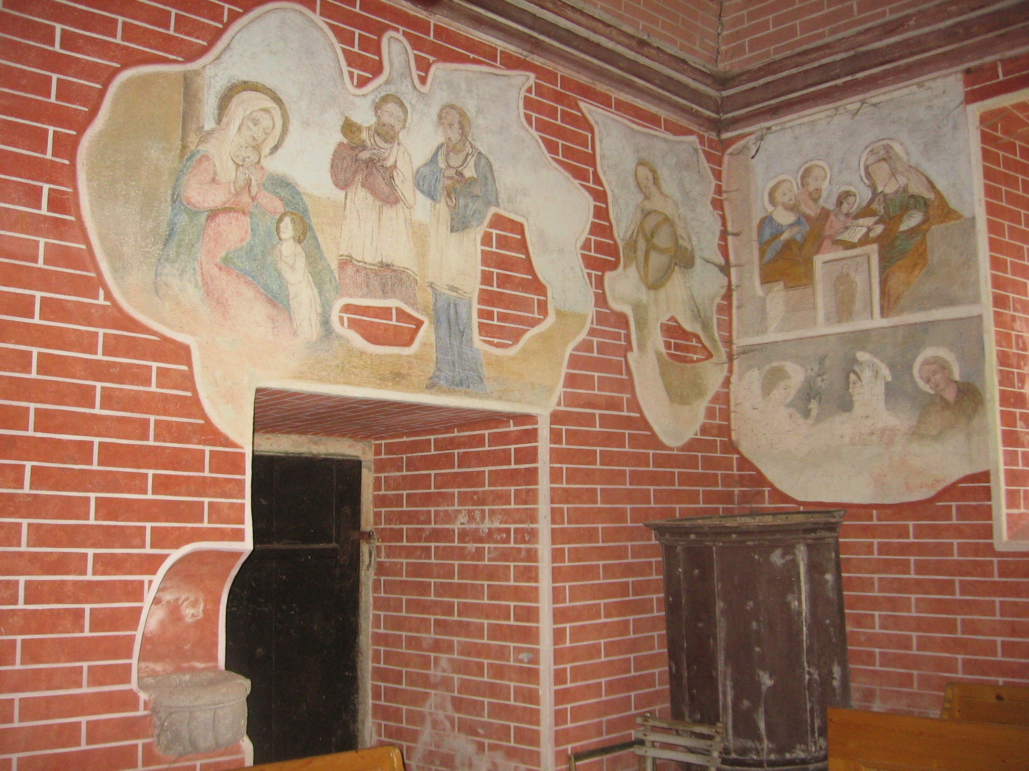 Loreta - interiér, Týnec (okres Klatovy).